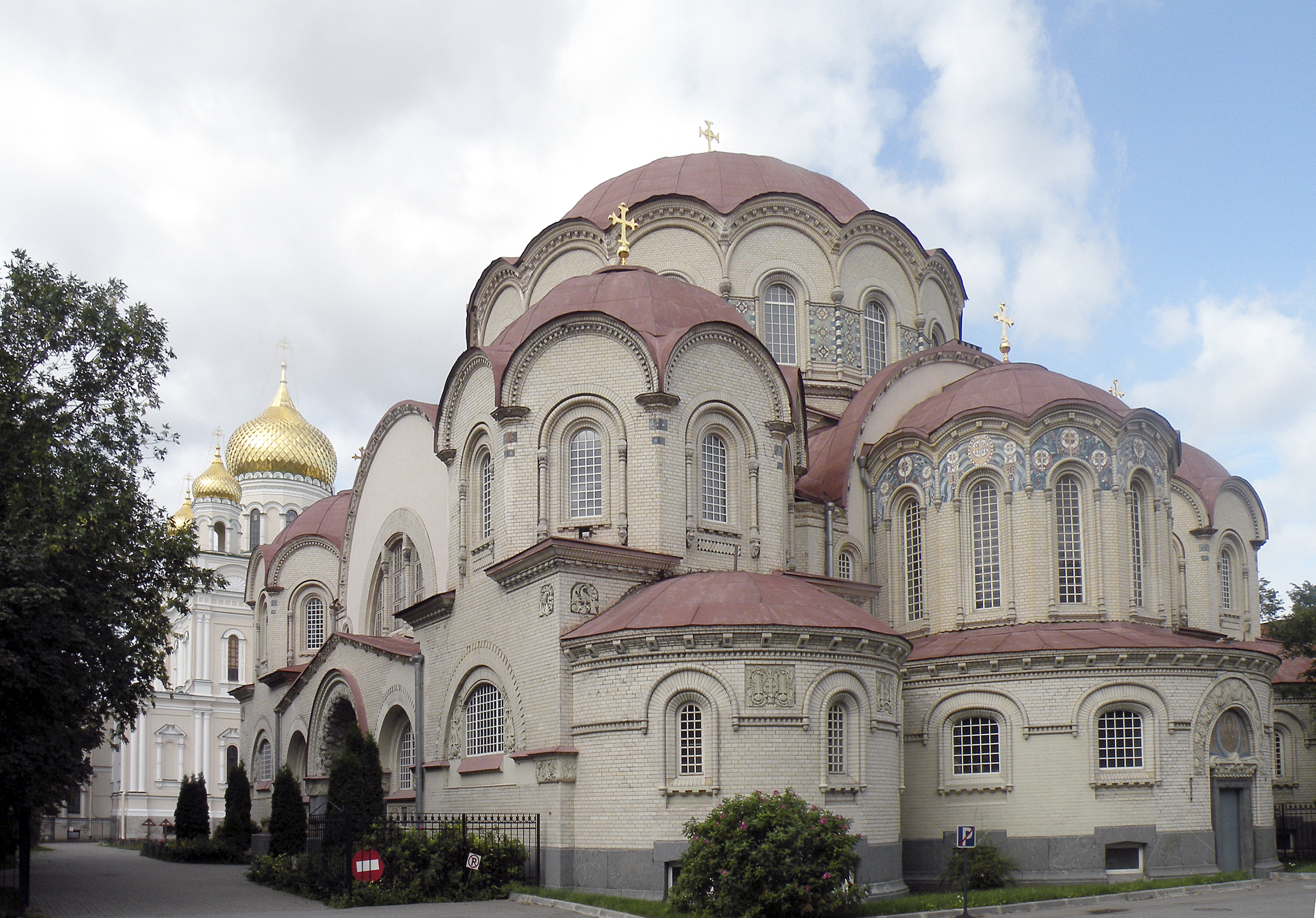 Казанская и Воскресенская (на заднем плане) церкви.Новодевичий монастырь.СПб